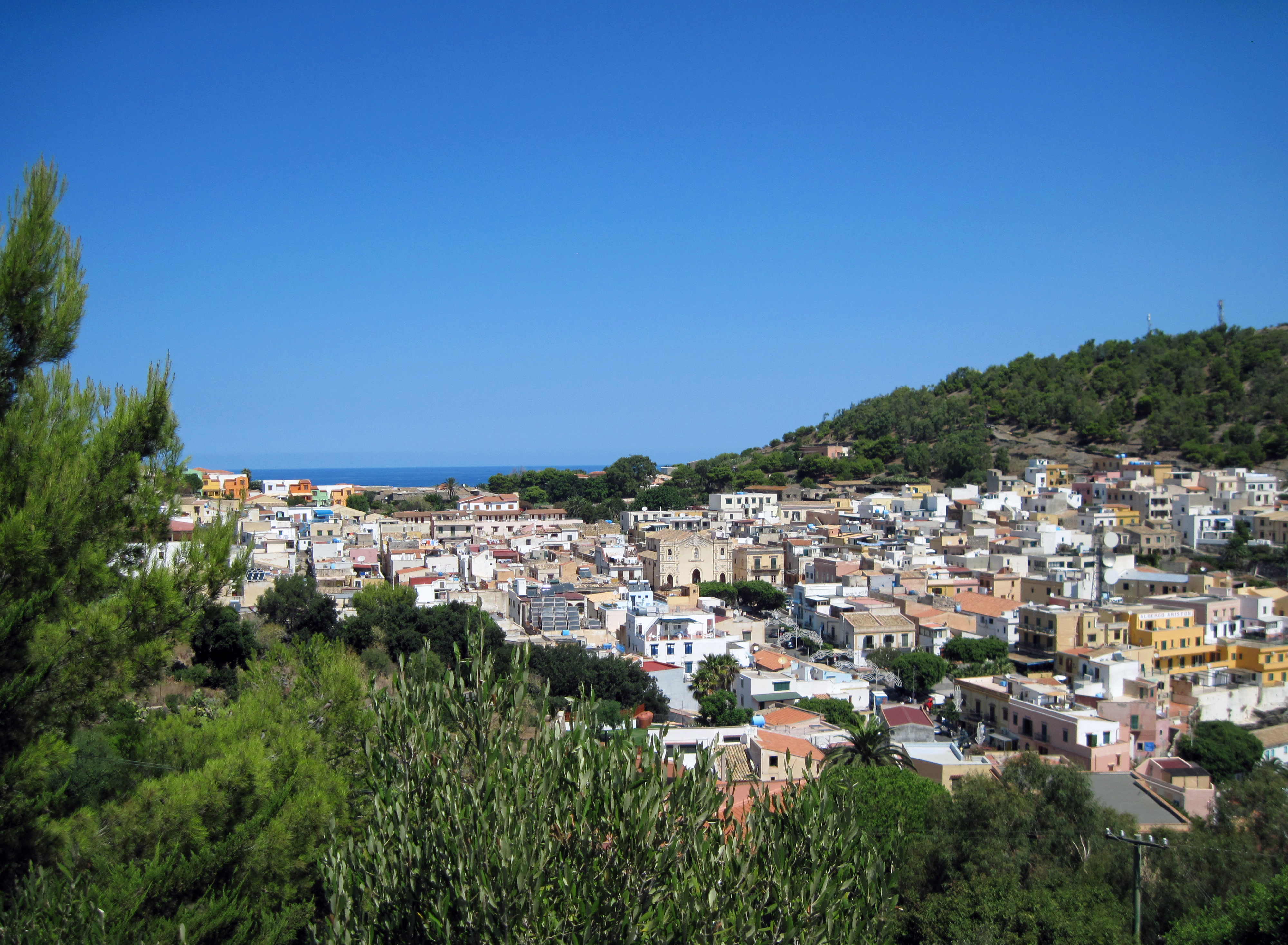 Per chi ha l'isola nel cuore...